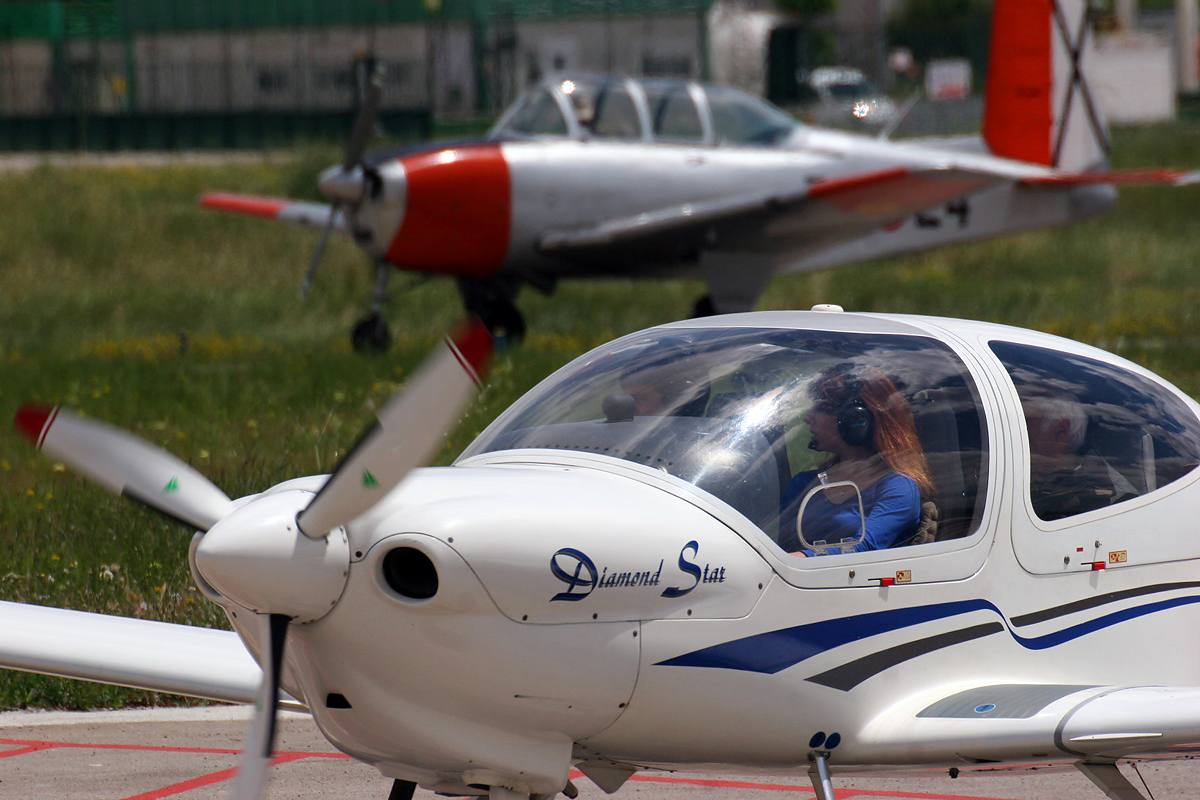 Sabadell (LELL/QSA) Airport